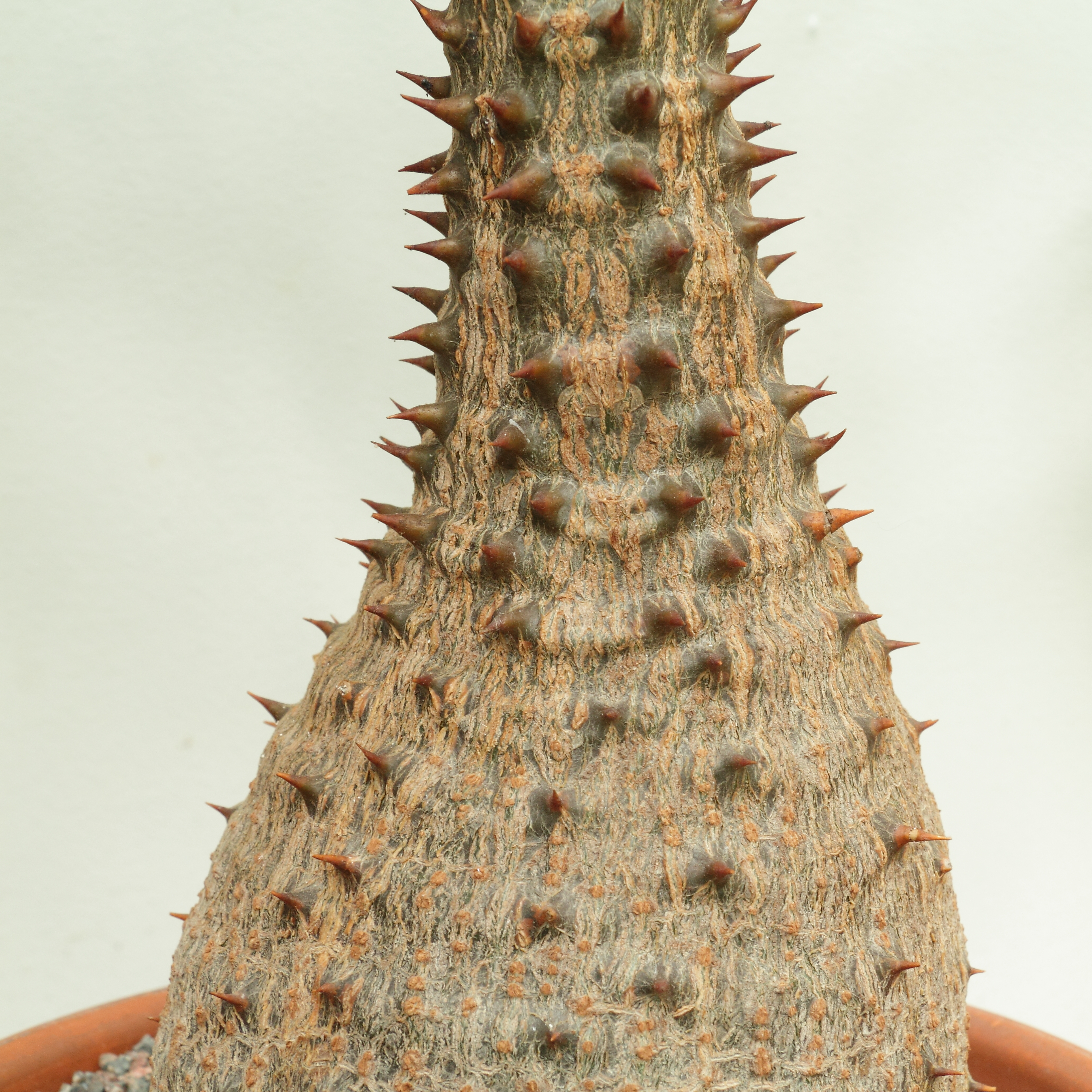 Pachypodium baronii, identifierad med hjälp av befintlig skylt vid Bergianska trädgården.